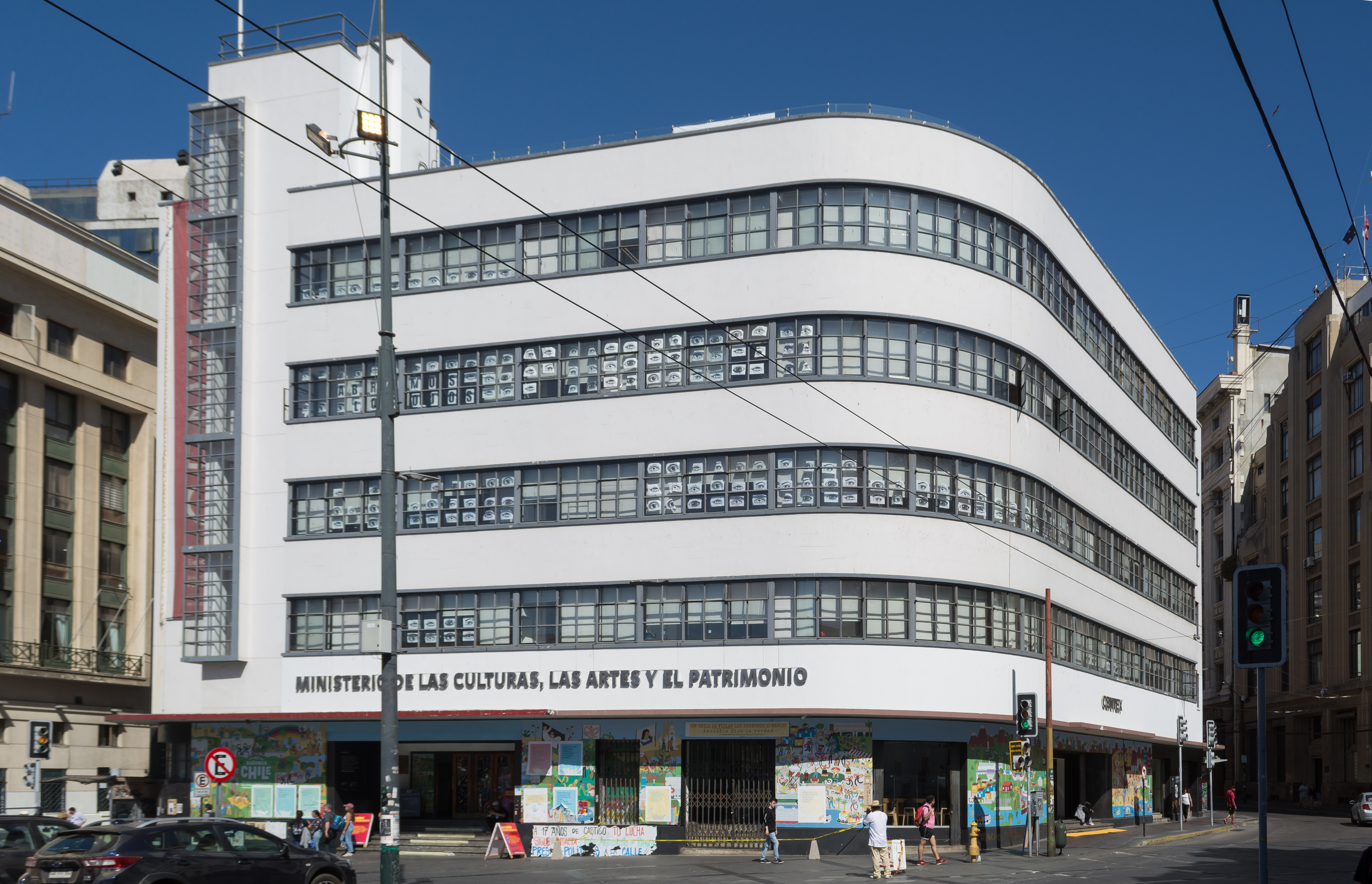 Ministerio de las Culturas, las Artes y el Patrimonio, Valparaíso, Región de Valparaíso, Chile